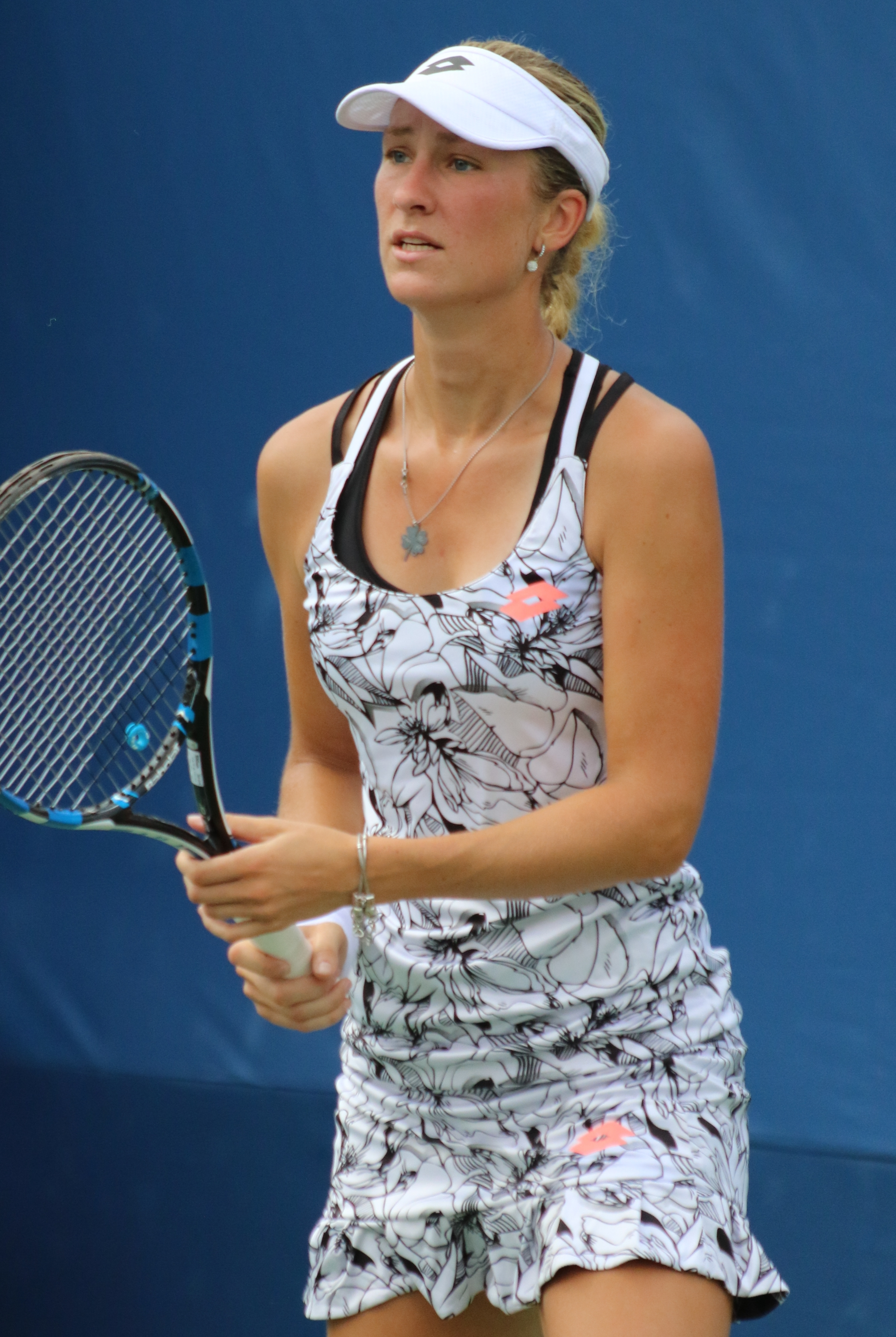 Allertova US16 (12)